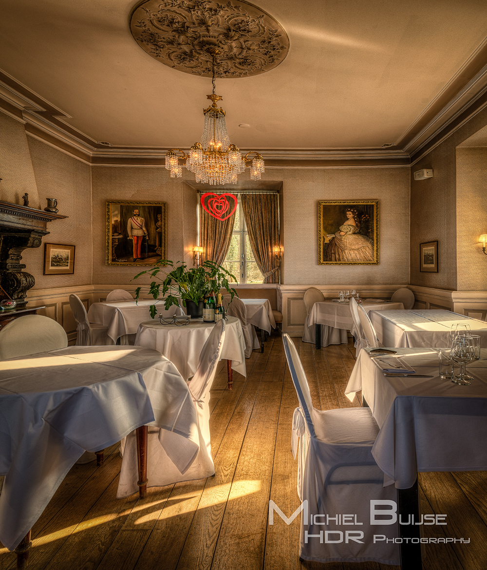 Замок Эренштайн, столовая.